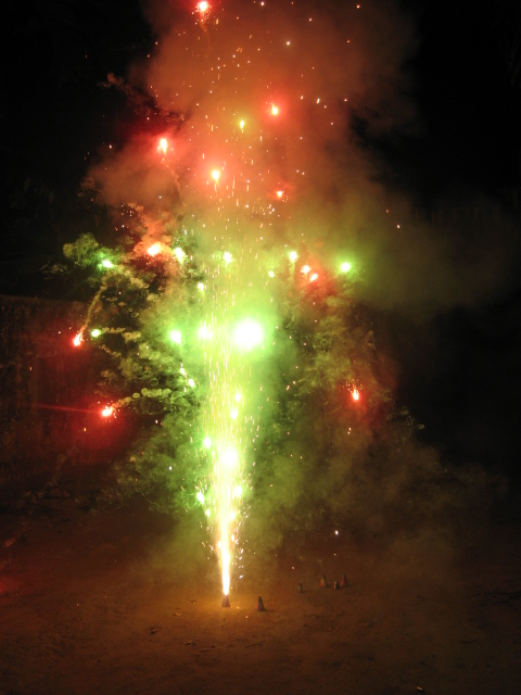 വിഷു ആഘോഷങ്ങളിലെ മത്താപ്പ് കത്തുന്ന ദൃശ്യം